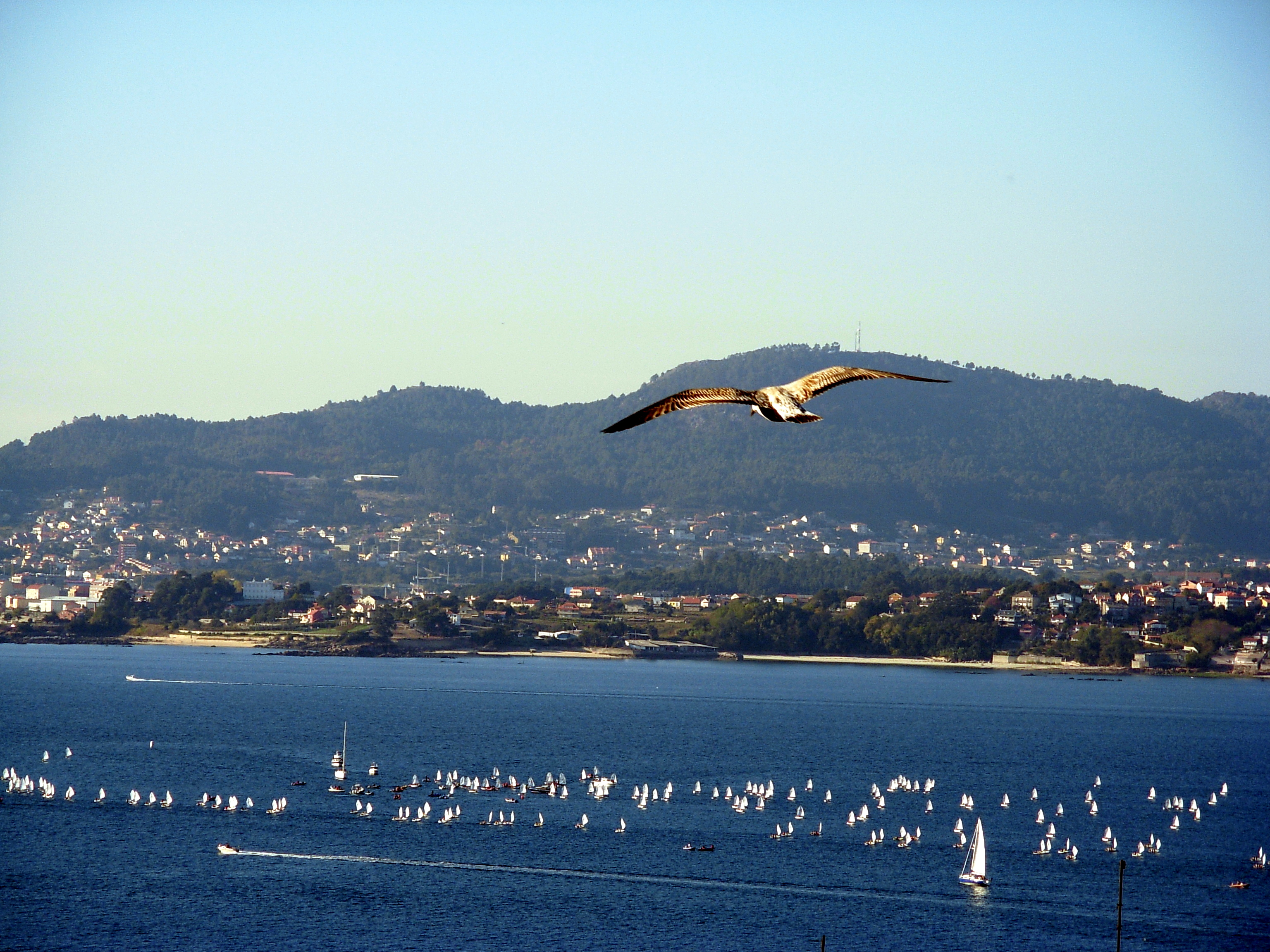 Regata en la Ria de Vigo